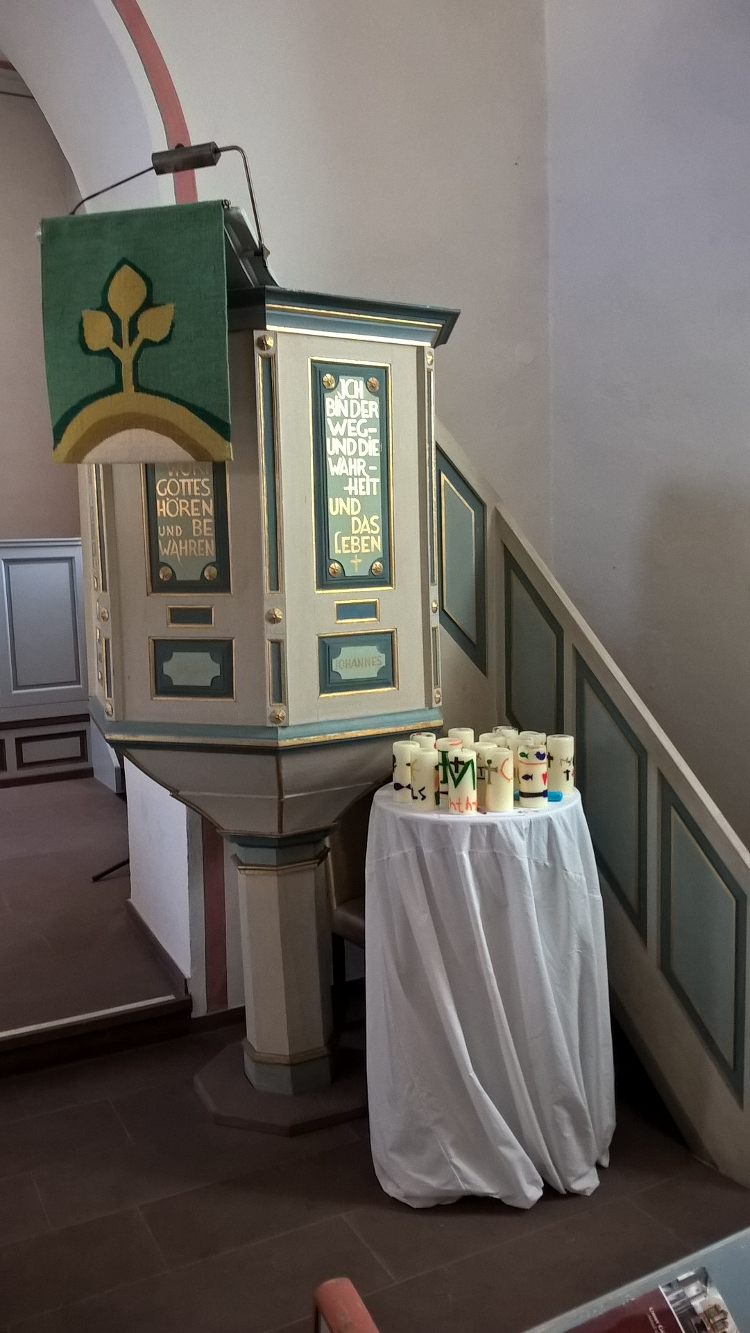 Evangelische Kirche Niederbiel, Solms, Lahn-Dill-Kreis, Hessen, Deutschland